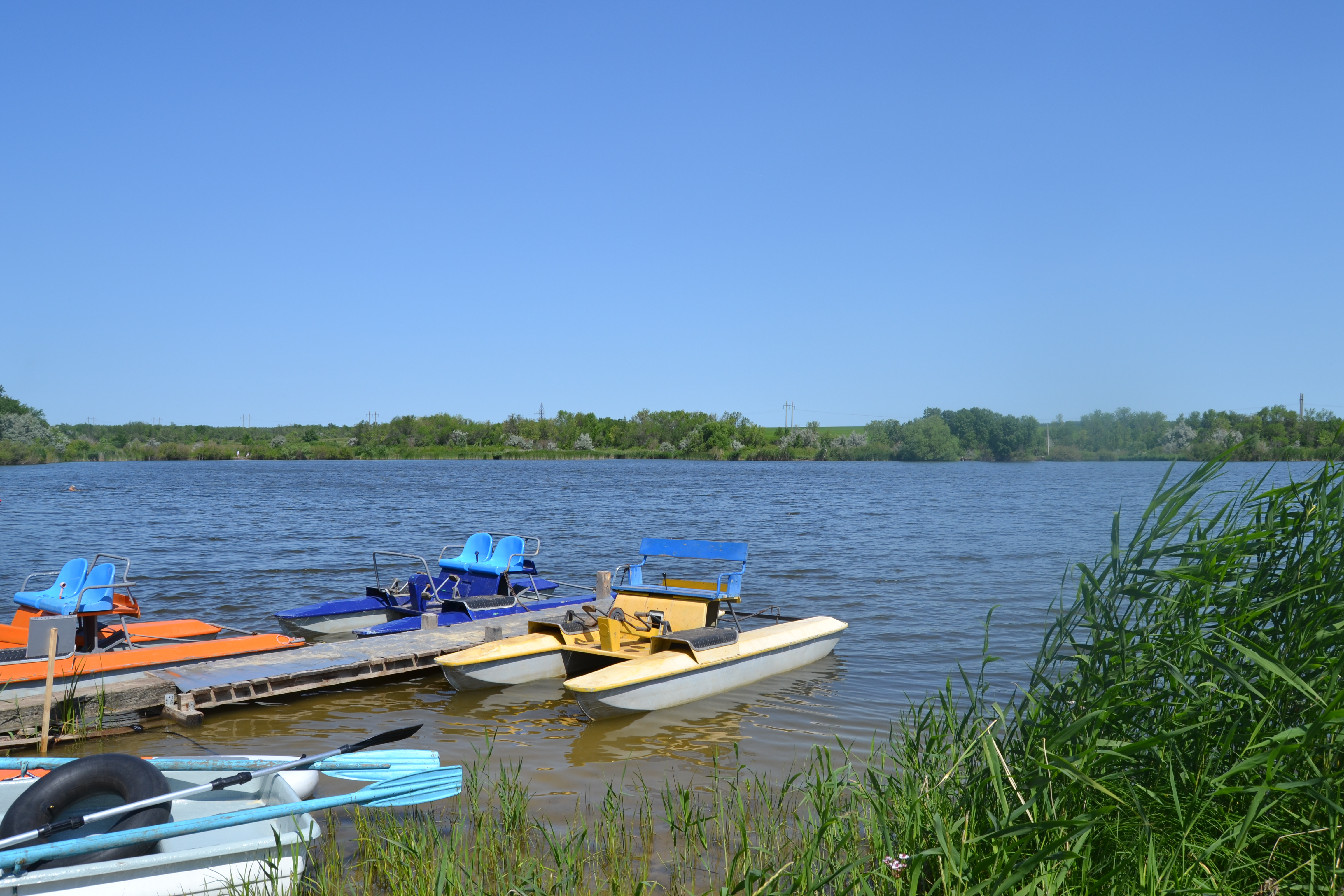 Изображение населённого пункта. Зона отдыха (Козлаковка, Саратовский район)